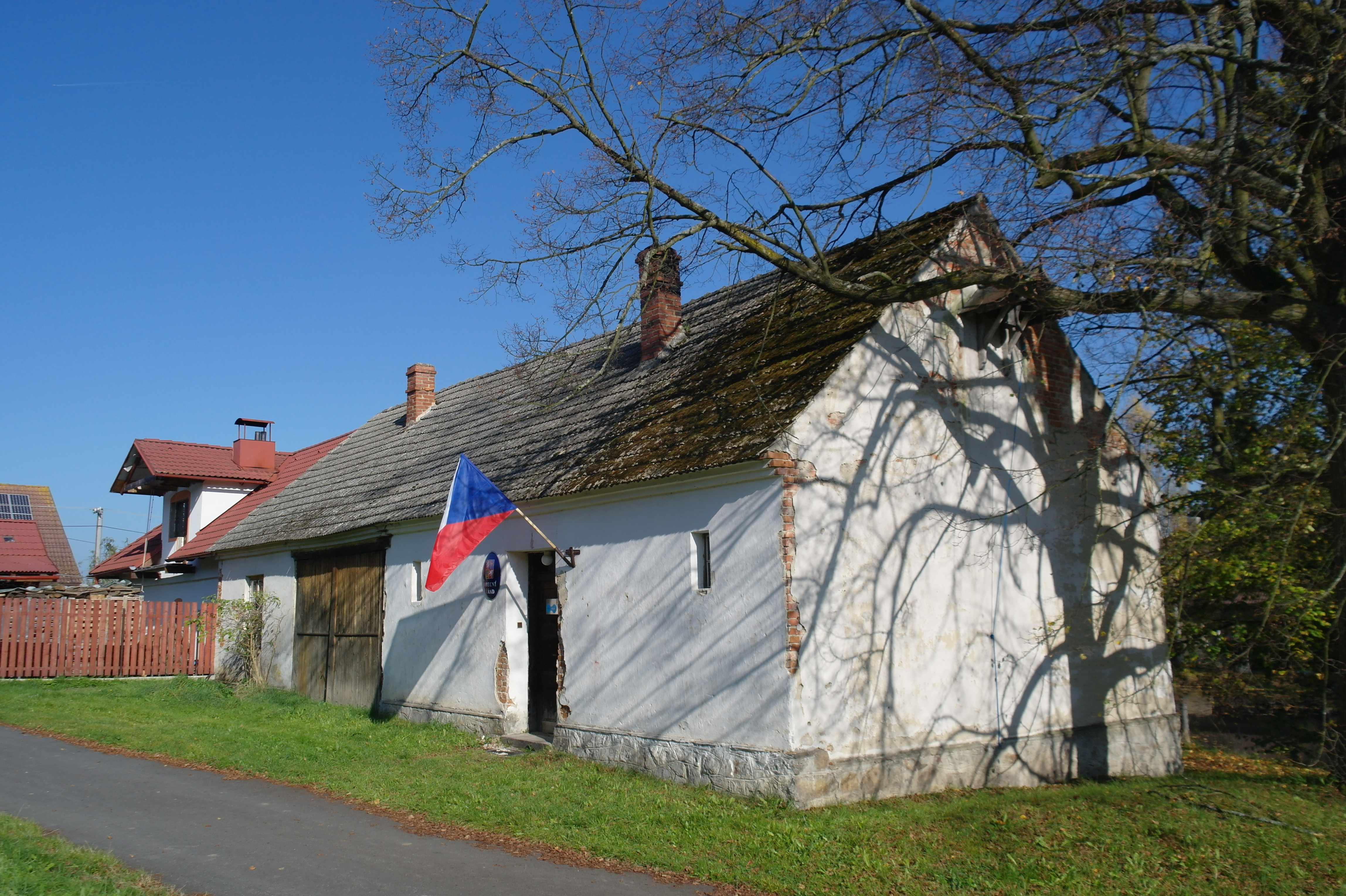 Budova obecního úřadu v obeci Hájek